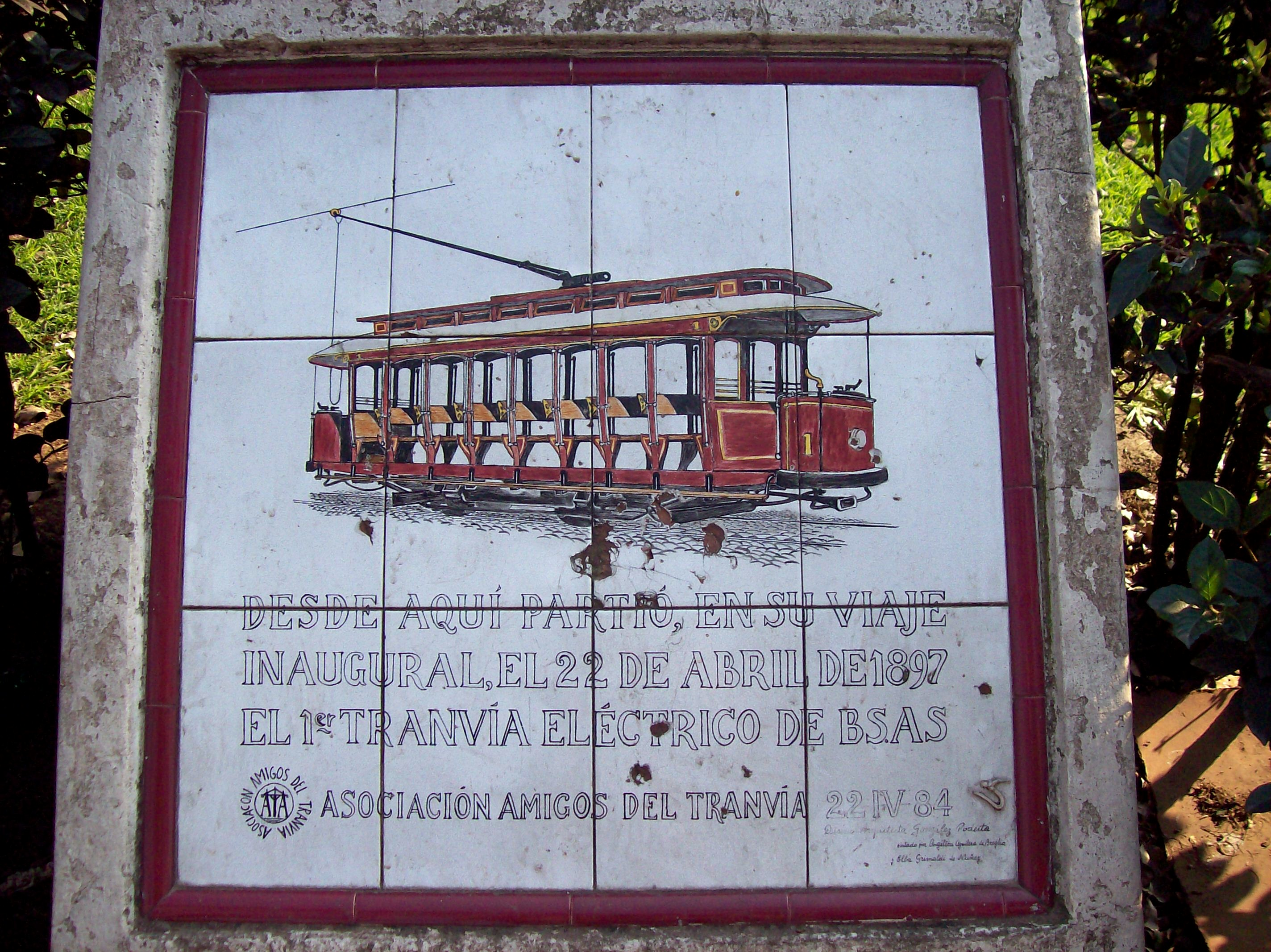 Mosaico, en la Plaza Italia, Barrio de Palermo, en Buenos Aires, Argentina. Diseño de la arquitecta González Podestá, pintada por Angélica Aguilera de Breglia y Elba Grimaldi de Nuñez. Recuerda la inauguración del primer tranvía eléctrico en 1897, que partió desde ese punto. Se encuentra en el borde de la Plaza, en la intersección de la curva de la Avenida Santa Fe con la extensión imaginaria de la calle Jorge L. Borges. Fue colocada en 1984 por la Asociación Amigos del Tranvía.